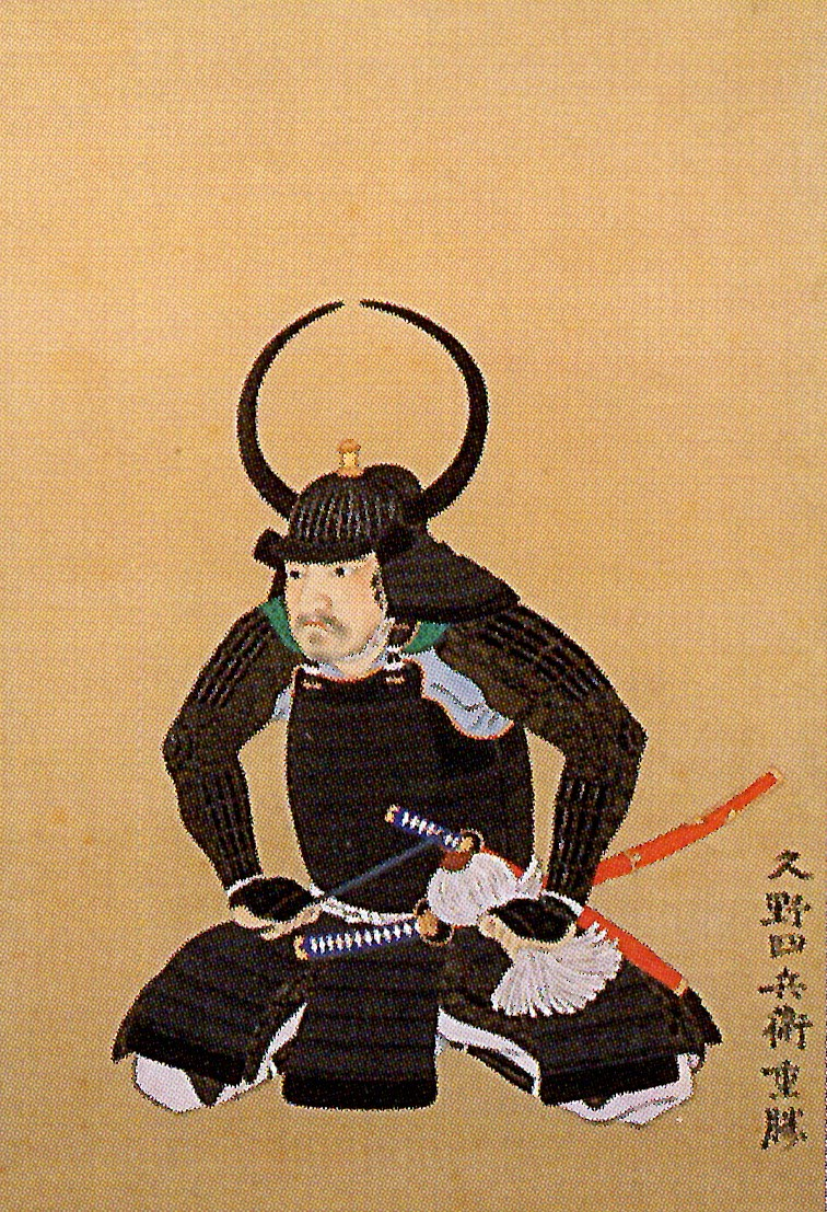 久野重勝の肖像。